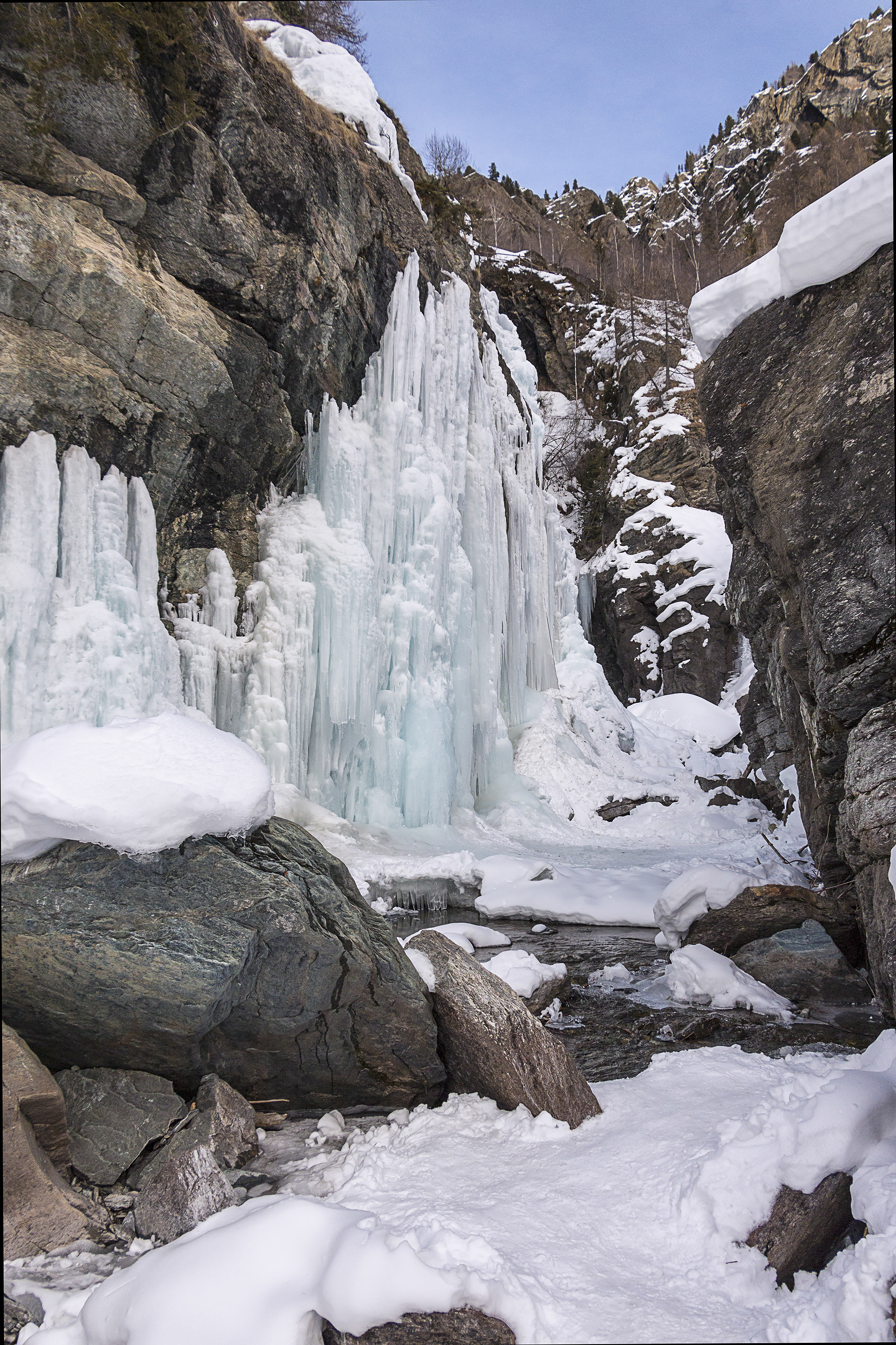 Le cascate di Lillaz , ghiacciate . This is a photo of a monument which is part of cultural heritage of Italy.